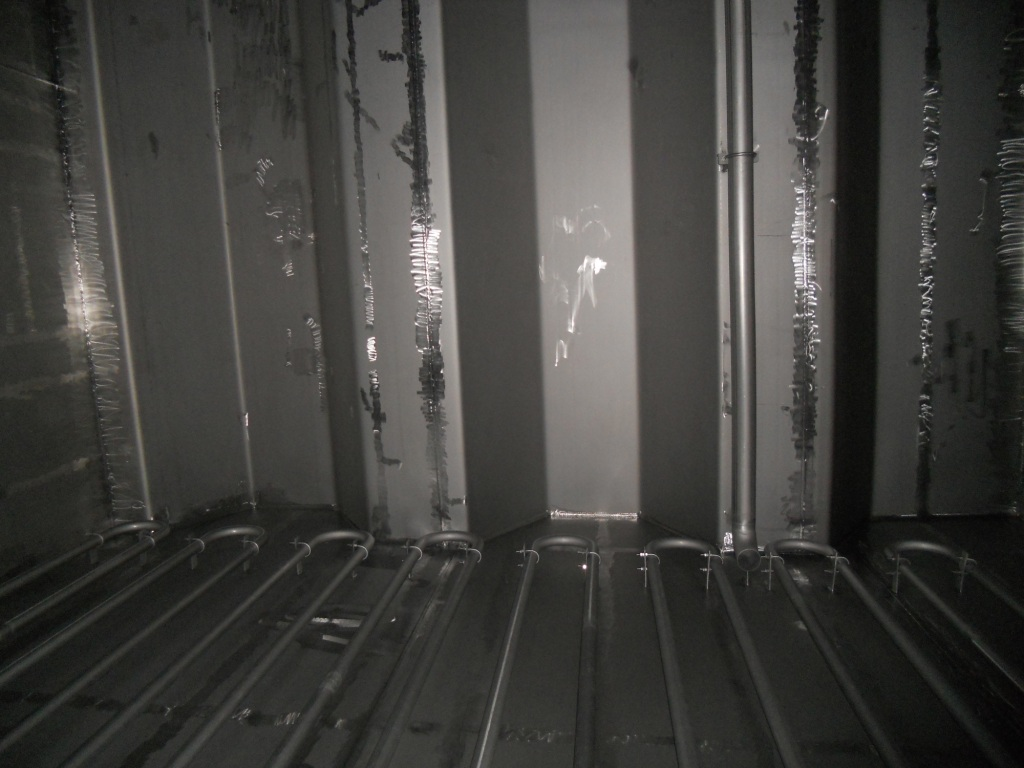 hier zie je een cargo tank uit inox van M/T Mozart